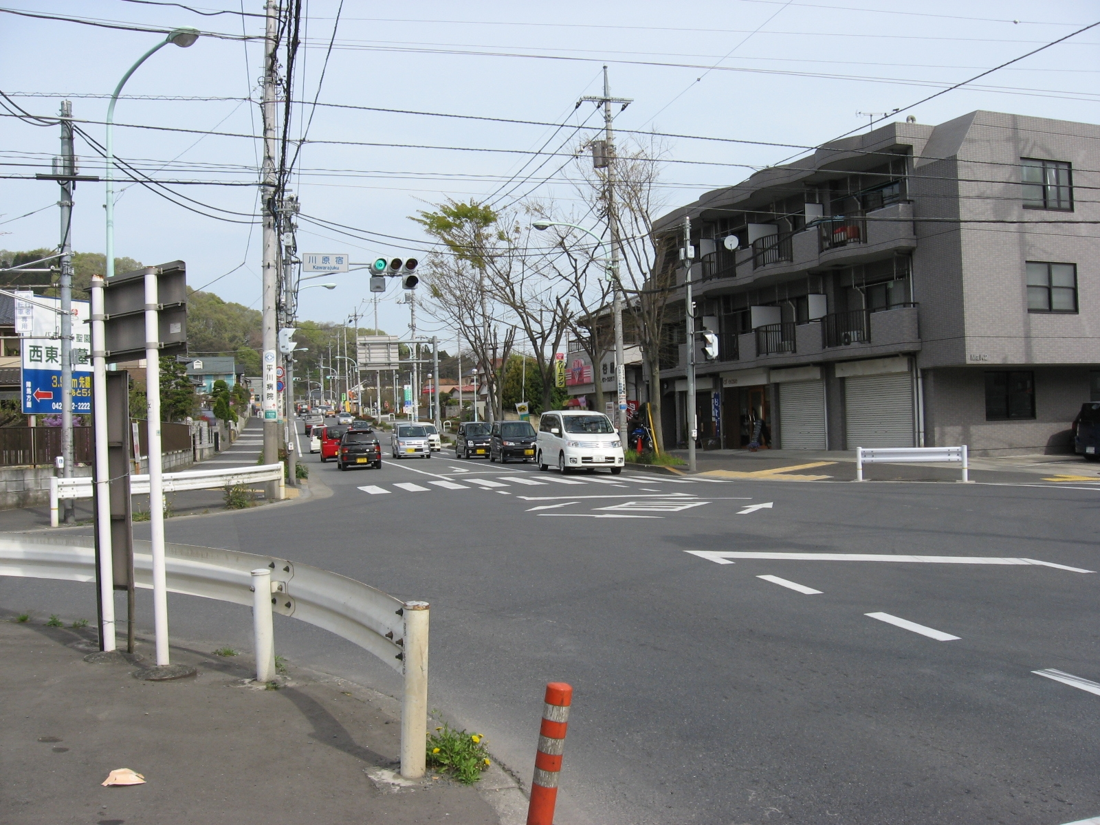 川原宿交差点 (東京都道61号山田宮の前線と東京都道521号上野原八王子線の交点)